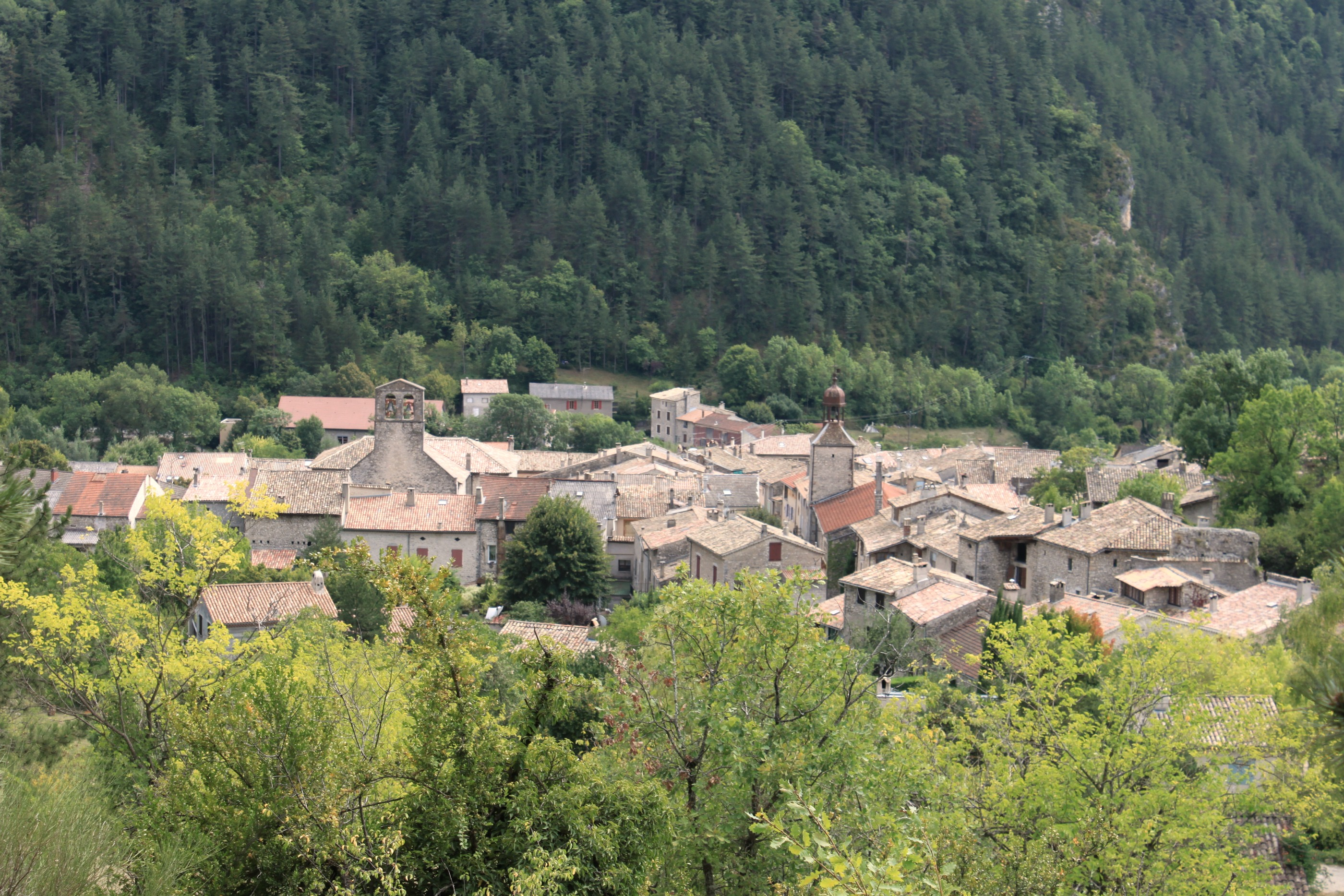 Le village de Châtillon-en-Diois